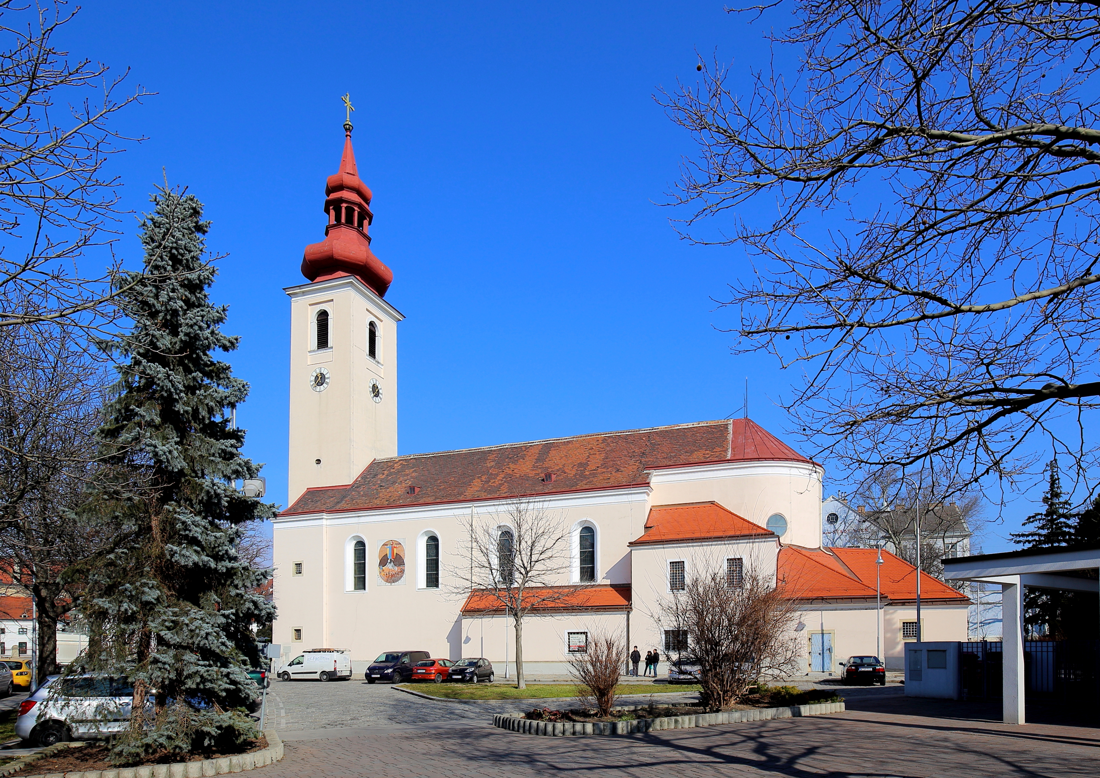 Südansicht der katholischen Pfarrkirche hll. Peter und Paul in Kaiserebersdorf, ein Ortsteil der österreichischen Bundeshauptstadt Wien.